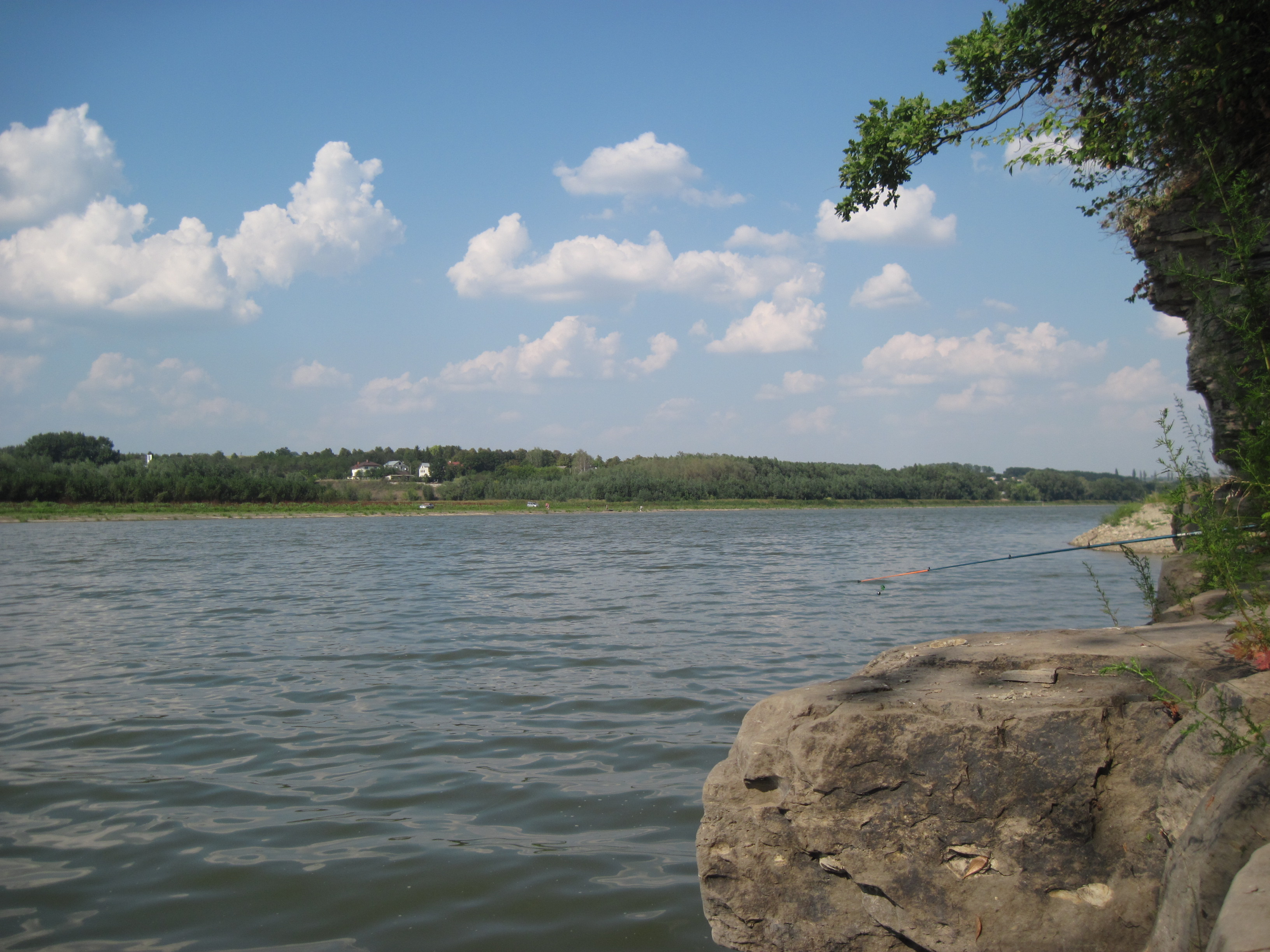 Літо 2016 р. "Калинівка".